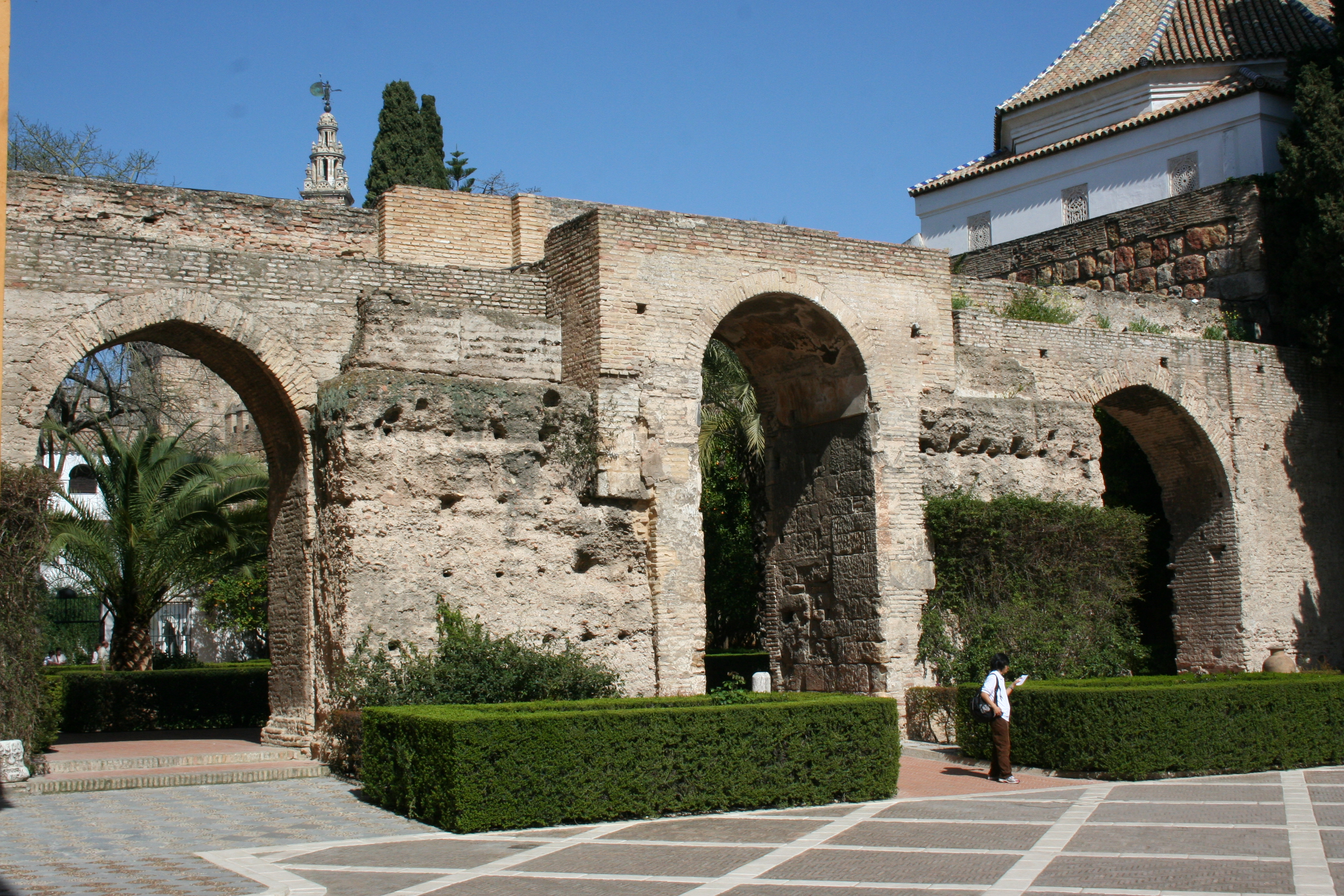 Alcázar de Sevilla.